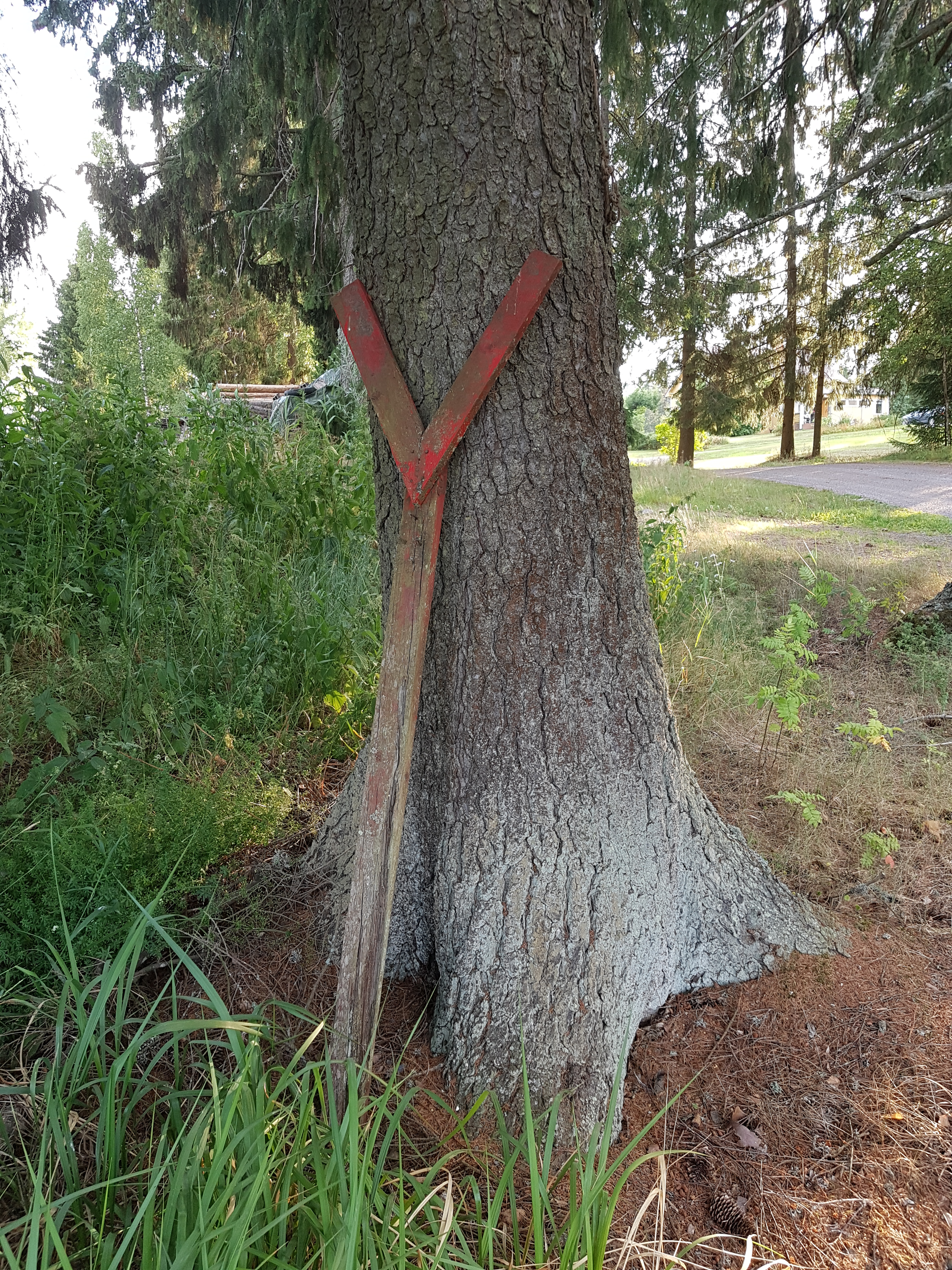 Vanha palokaivon opaste Ypäjällä Kanta-Hämeessä Suomessa